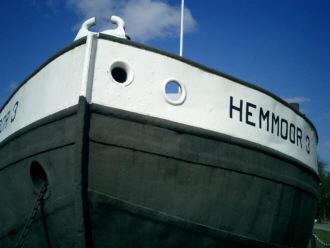 Zementleichter in Hemmoor Eigene Aufnahme, 2004